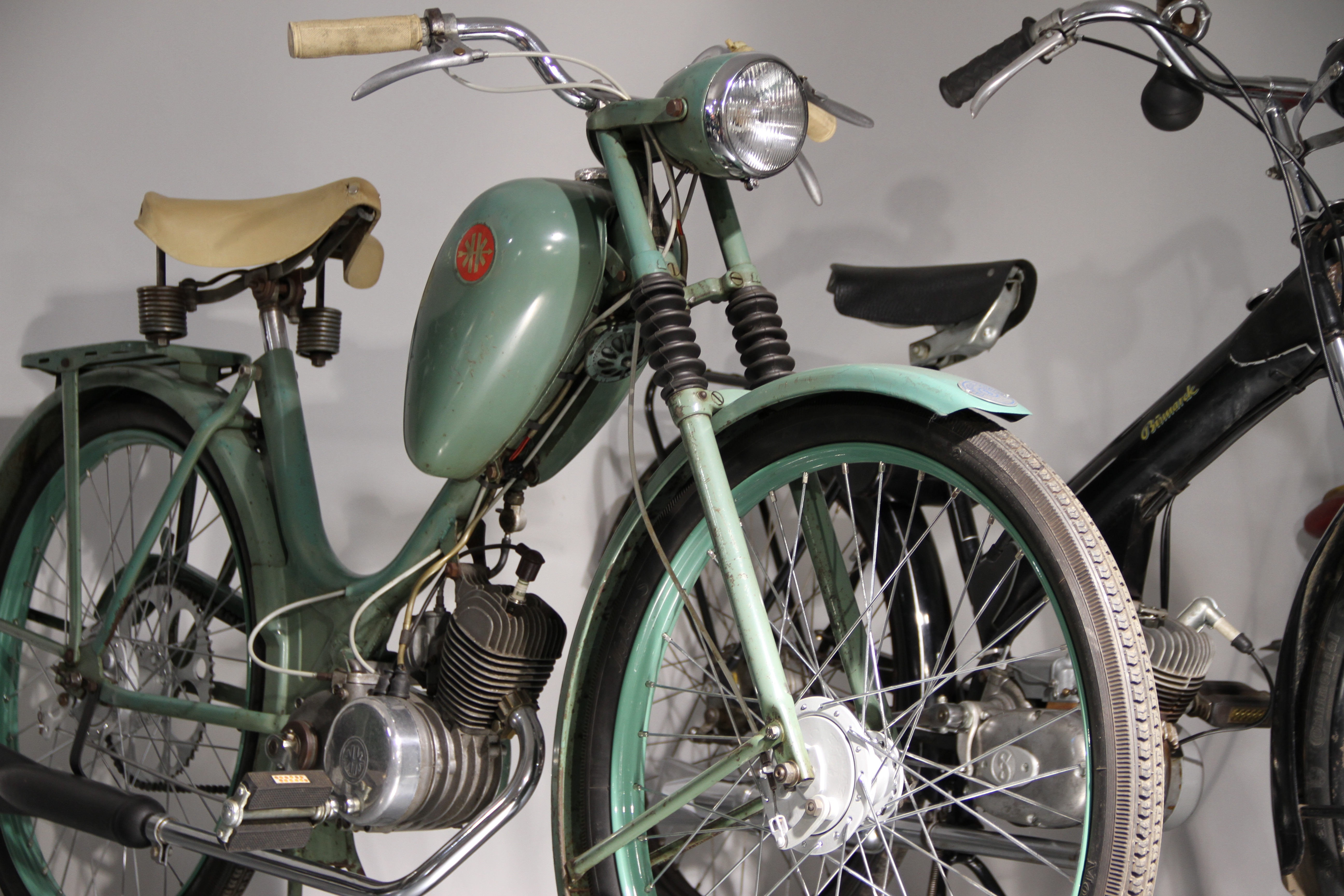 Baujahr 1954, 2-Takt 50 qcm Motor, 2,2 PS, 2-Ganggetriebe (Drehgriffschaltung), 50 km/h